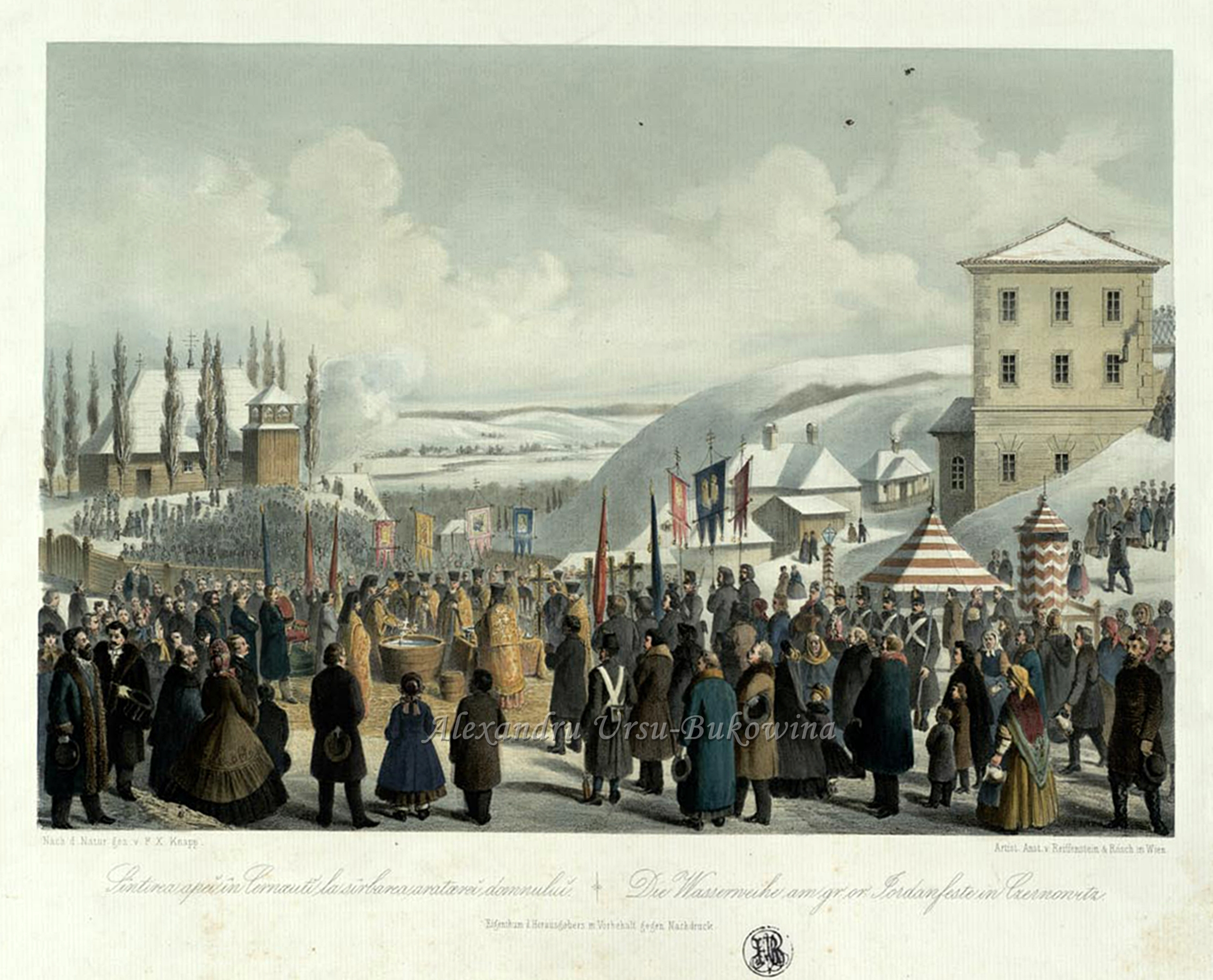 Die Wasserweihe am gr. or. Jordanfeste in Czernowitz